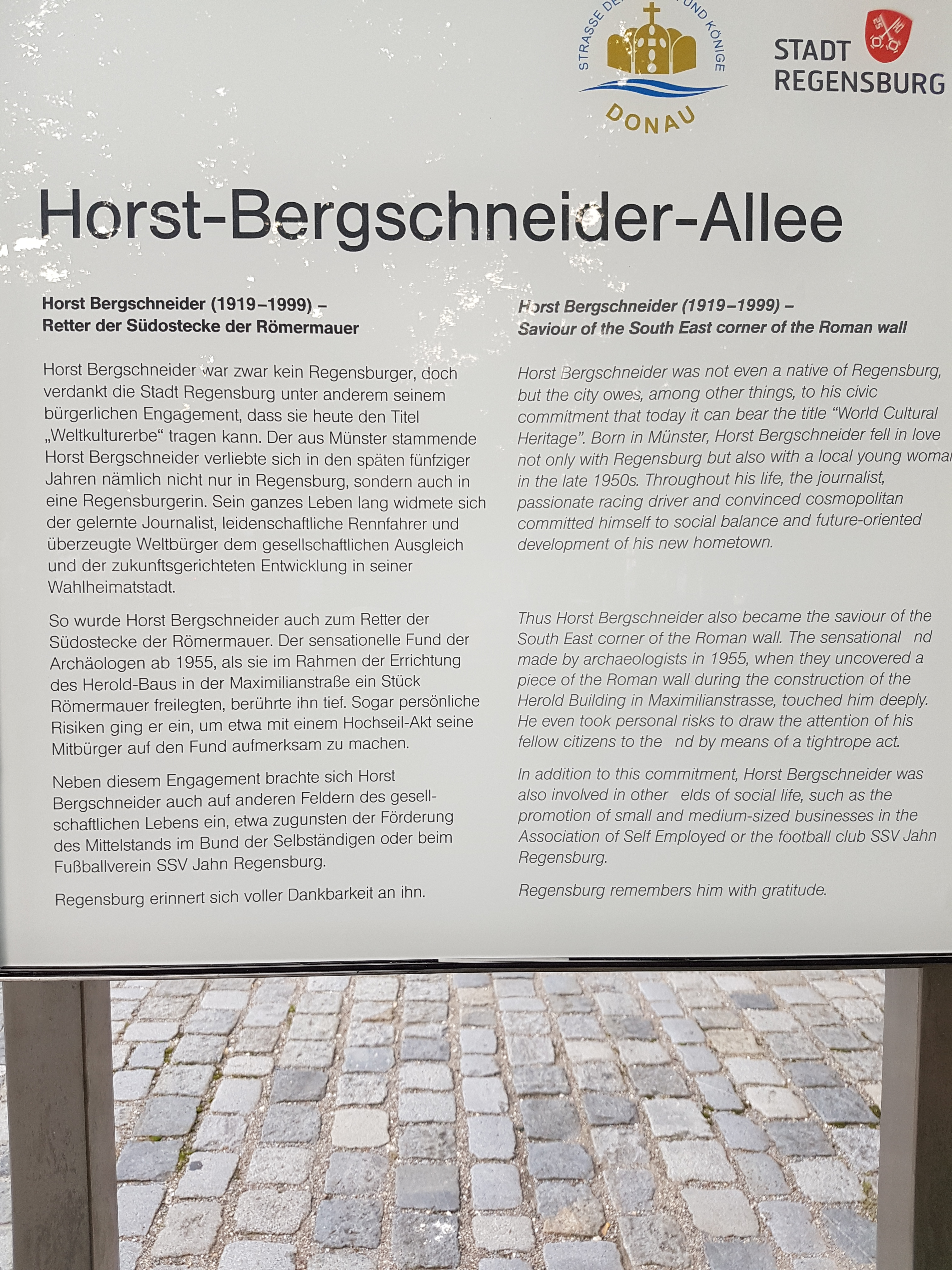 Gedenktafel für Horst Bergschneider, der durch sein Engagement die Römermauer rettete. Im zu Ehren wurde ein Alleestück in Regensburg benannt.